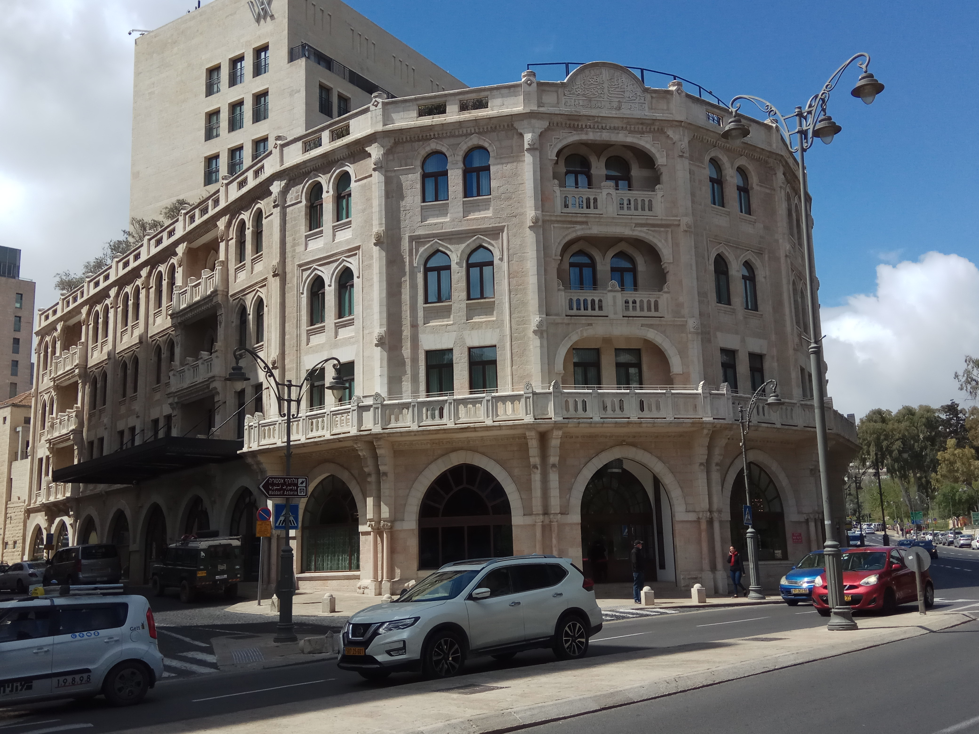 מלון וולדורף אסטוריה במבנה מלון פאלאס בירושלים